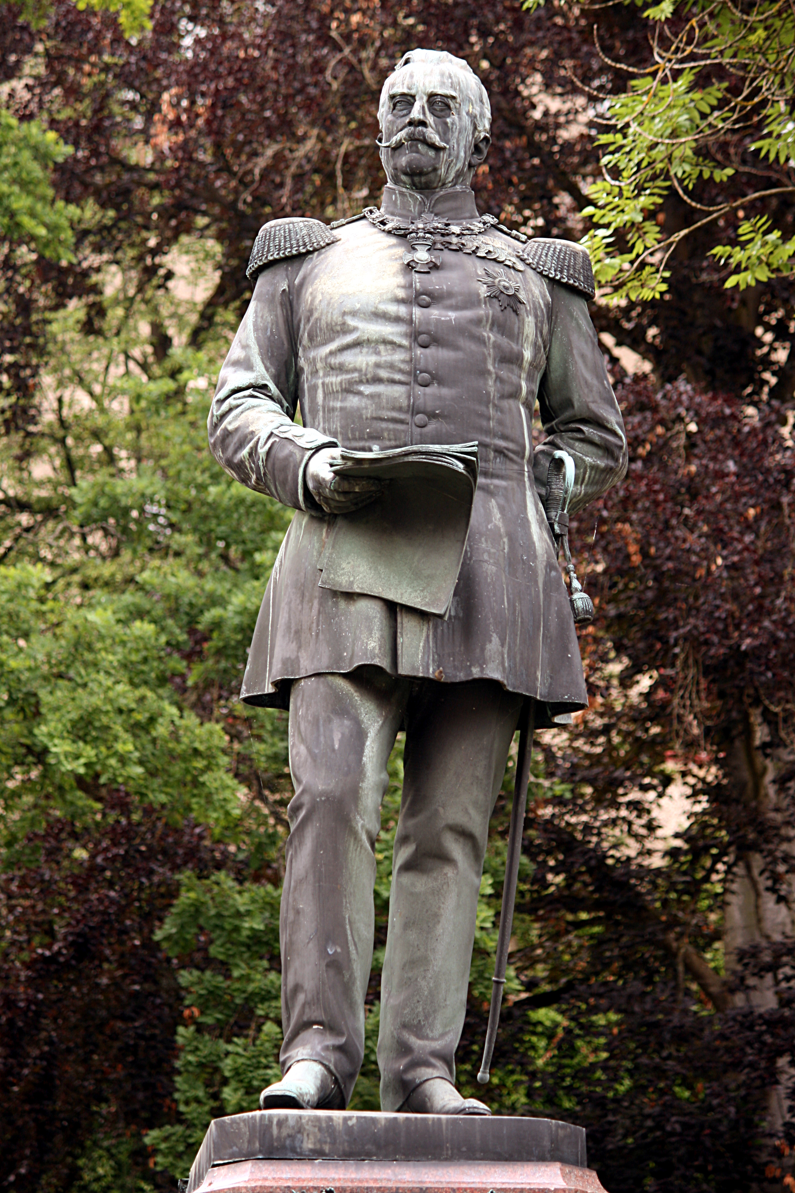 Sigmaringen - Standbild des Fürsten Karl Anton von Hohenzollern, Karl-Anton-Platz an der Fürst-Wilhelm-Straße